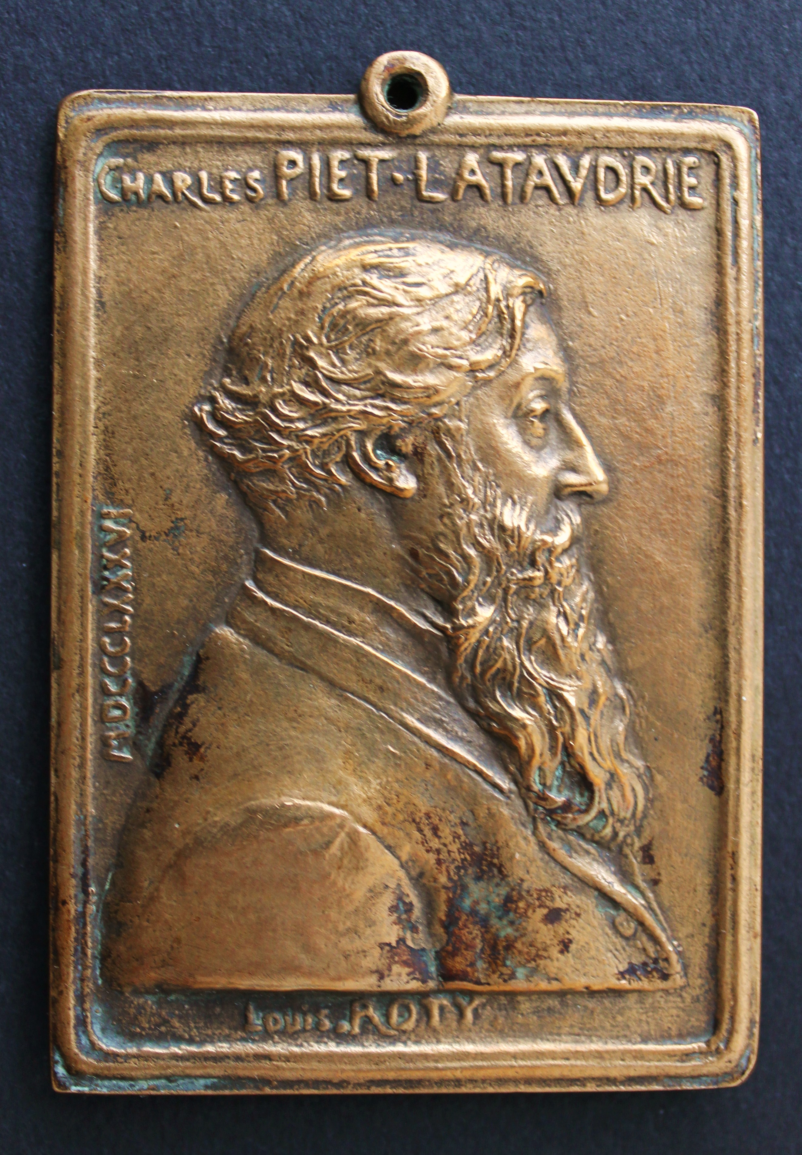 Charles Pascal Marie Piet-Lataudrie (1837-1909) grand collectionneur d'art. Il légua toute sa collection à des musées de Paris et au musée de Niort, sa ville natale. Médaille en bronze réalisée par Louis Oscar Roty en 1886.